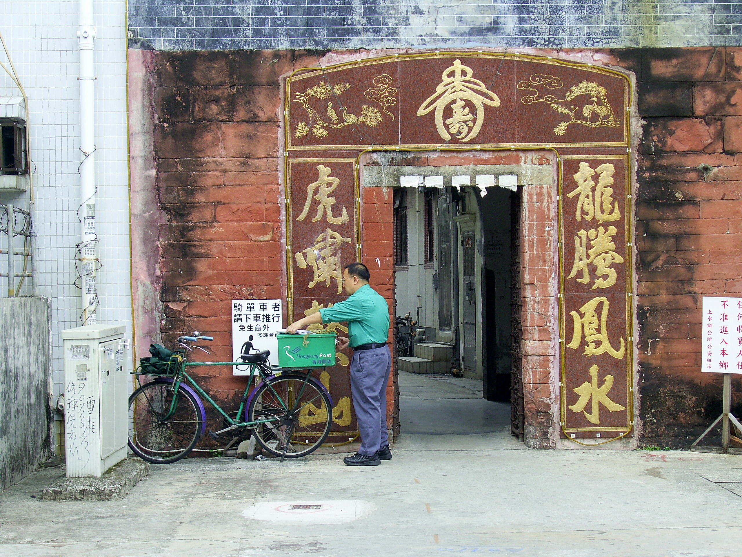 中文（香港）: 一名郵差騎單車在上水鄉派遞郵件